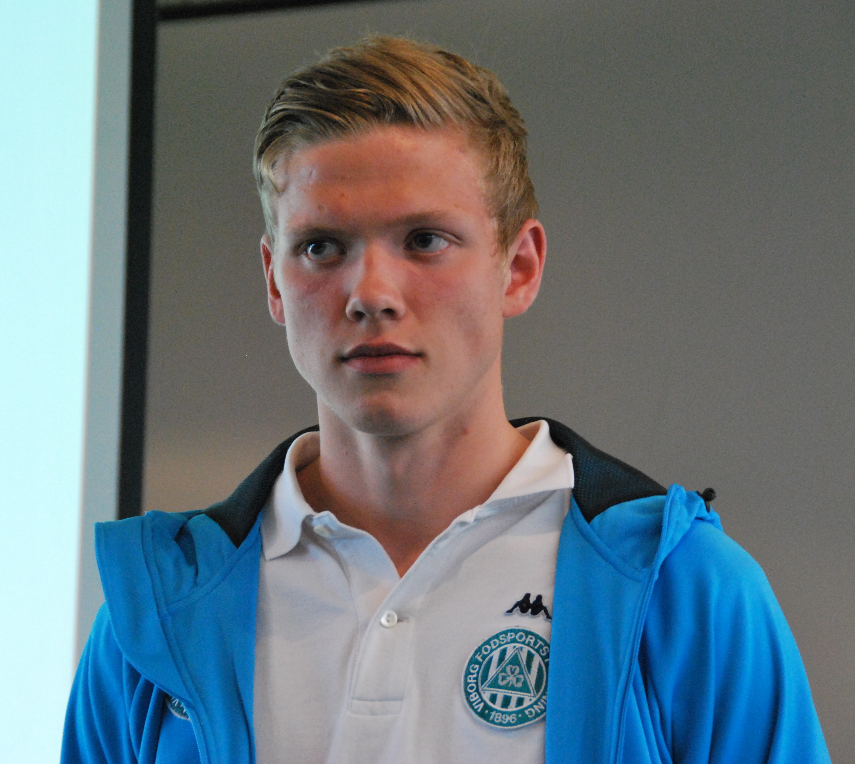 Fodboldspilleren Lucas Jensen fra Viborg FF. Her ved præsentation af spillertruppen for foråret 2012.